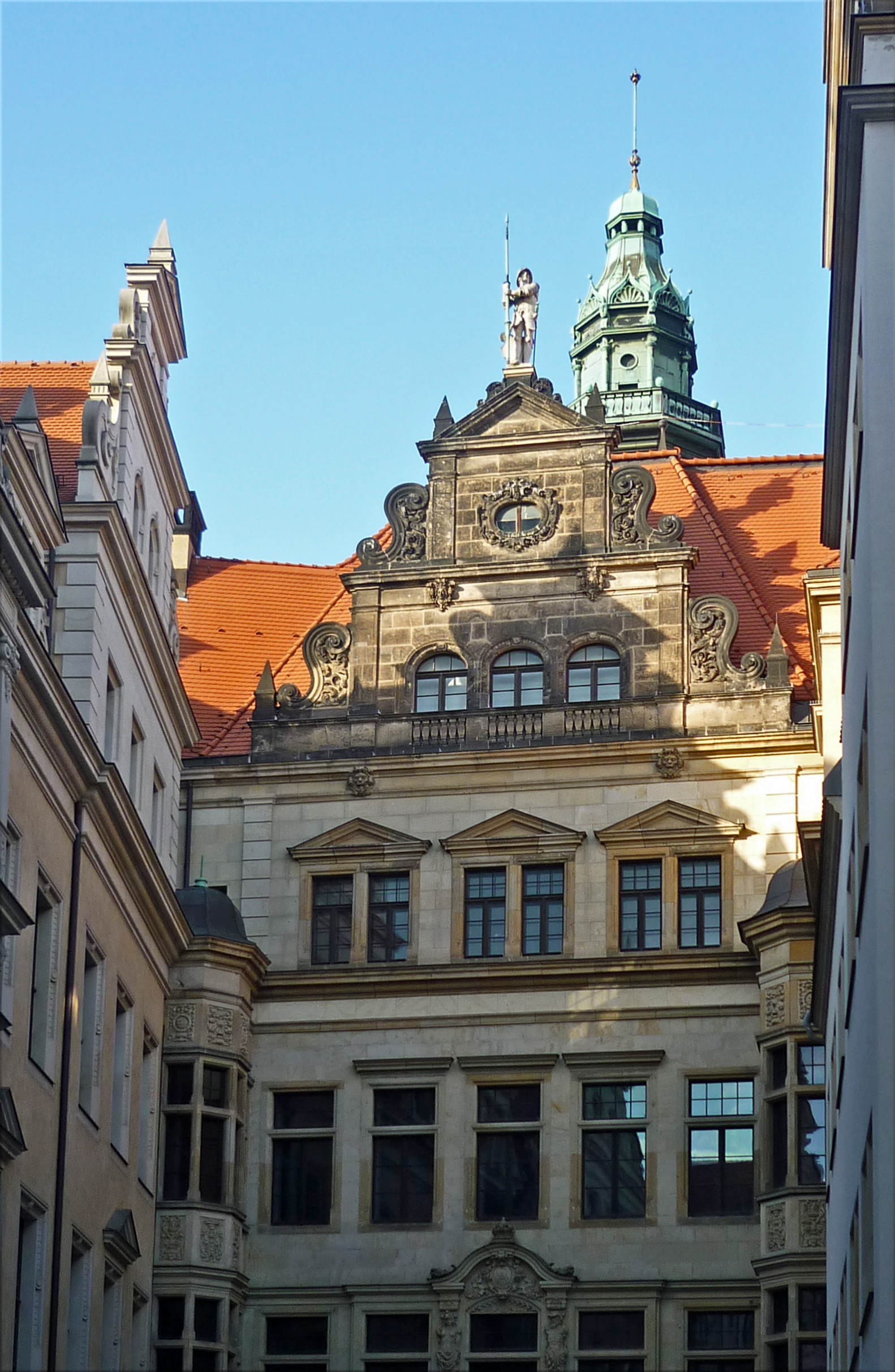 Südfassade des Georgenbaus am Residenzschloss in Dresden